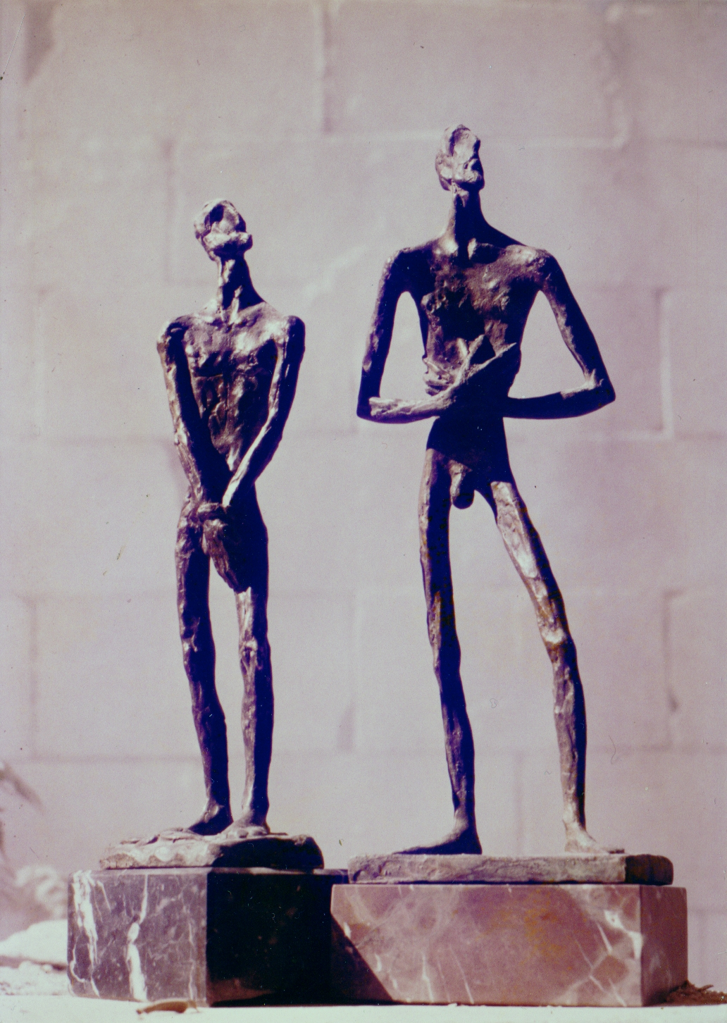 Bronces.